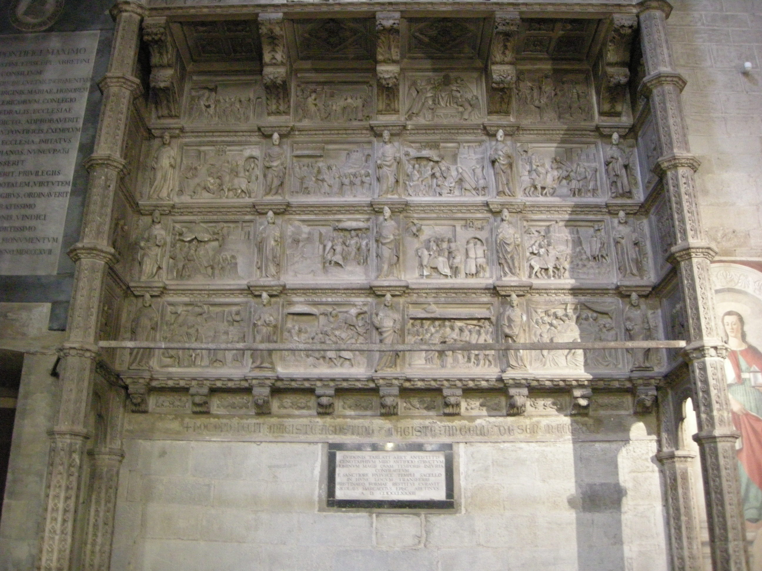 Duomo di arezzo, interno, monumento funebre di Guido Tarlati, 1330